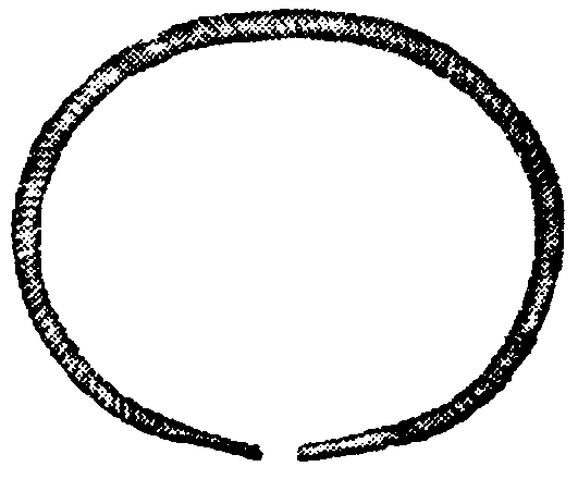 Armband, Armring af guld, sprialräfflad